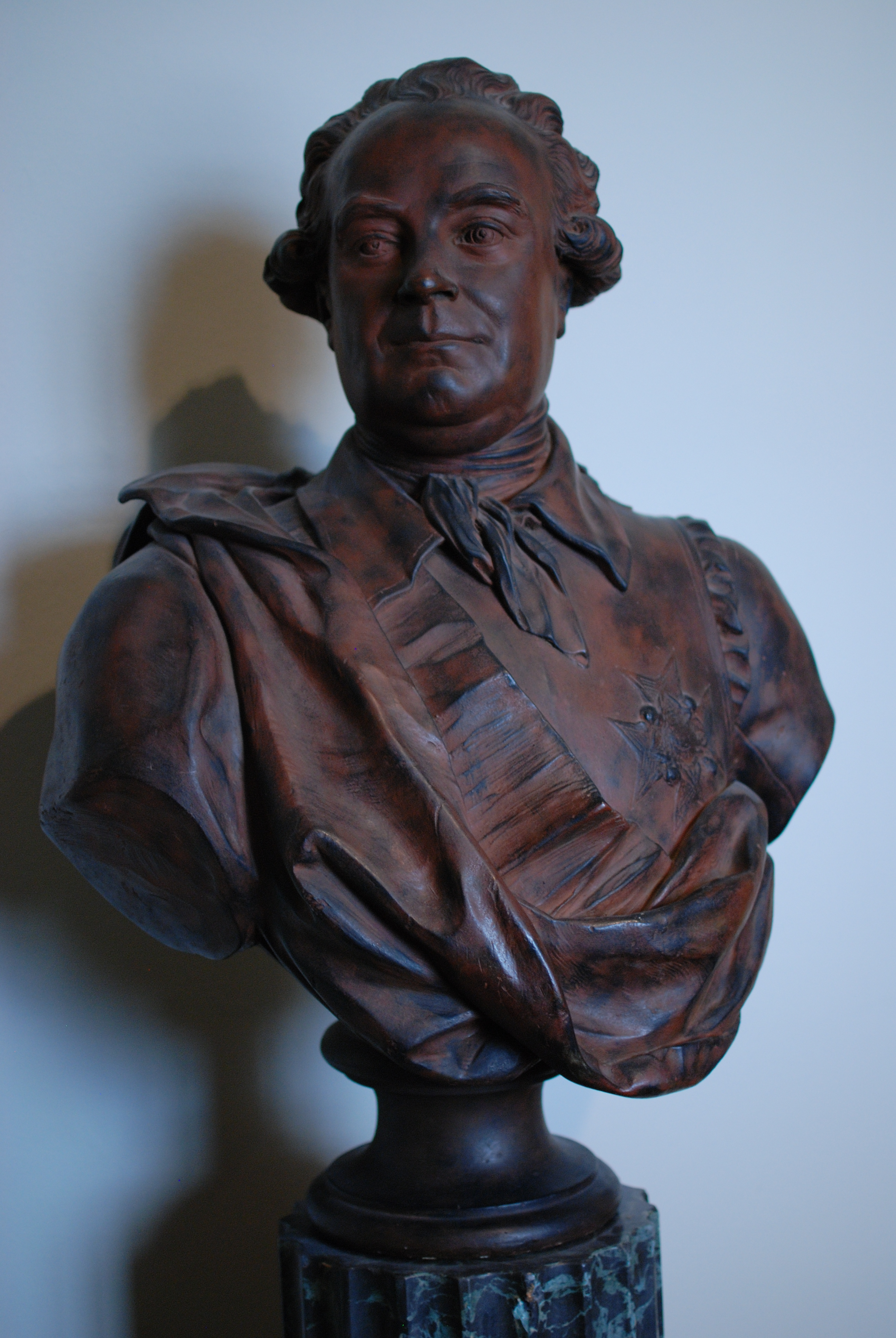 Överståthållare Carl Sparre av Johan Tobias Sergel 1740-1814. This is a photo of an artwork at the Gothenburg Museum of Art in Sweden with the identifier: GKM 343